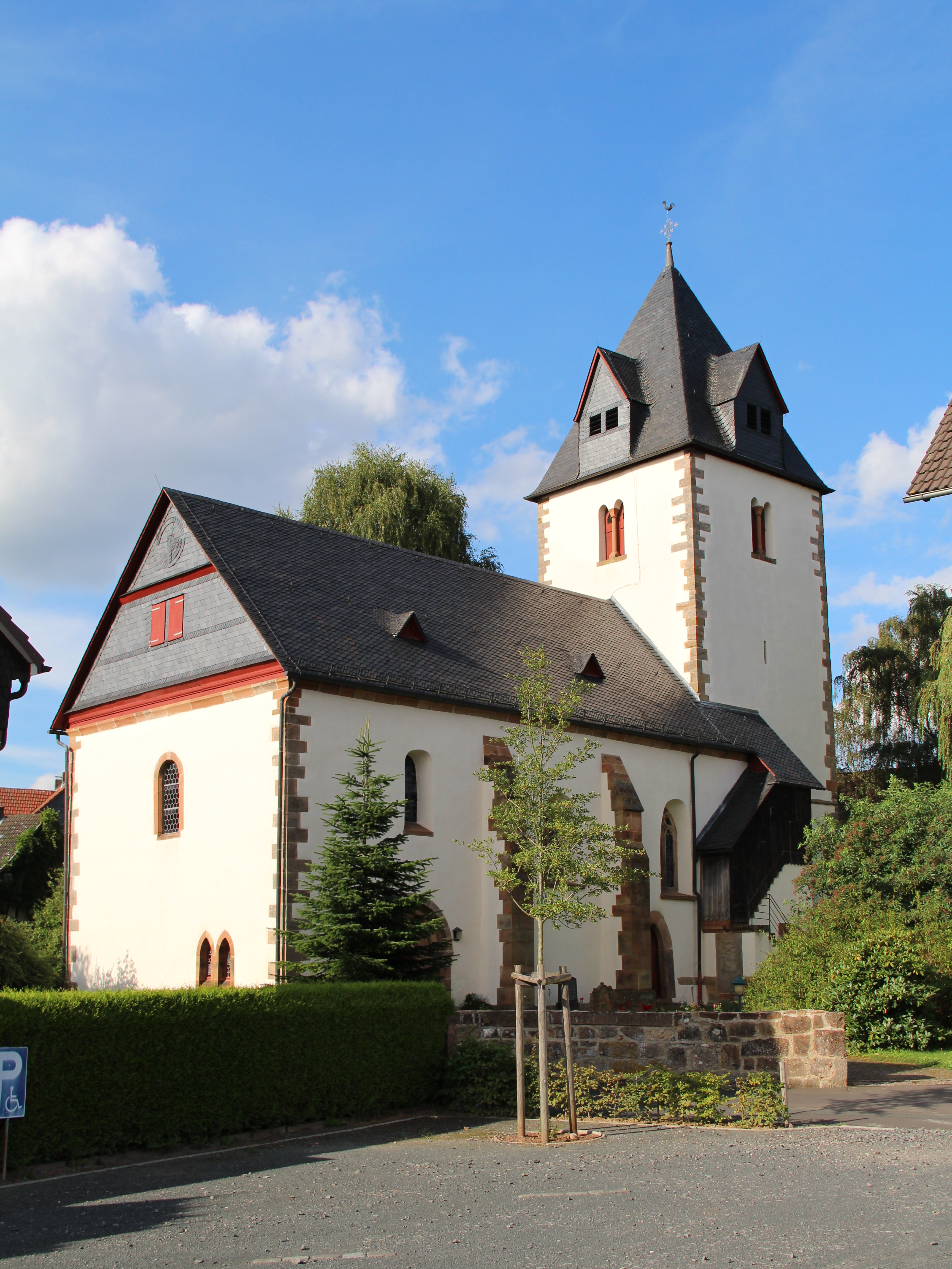 Michelbach (Marburg) - Kirche